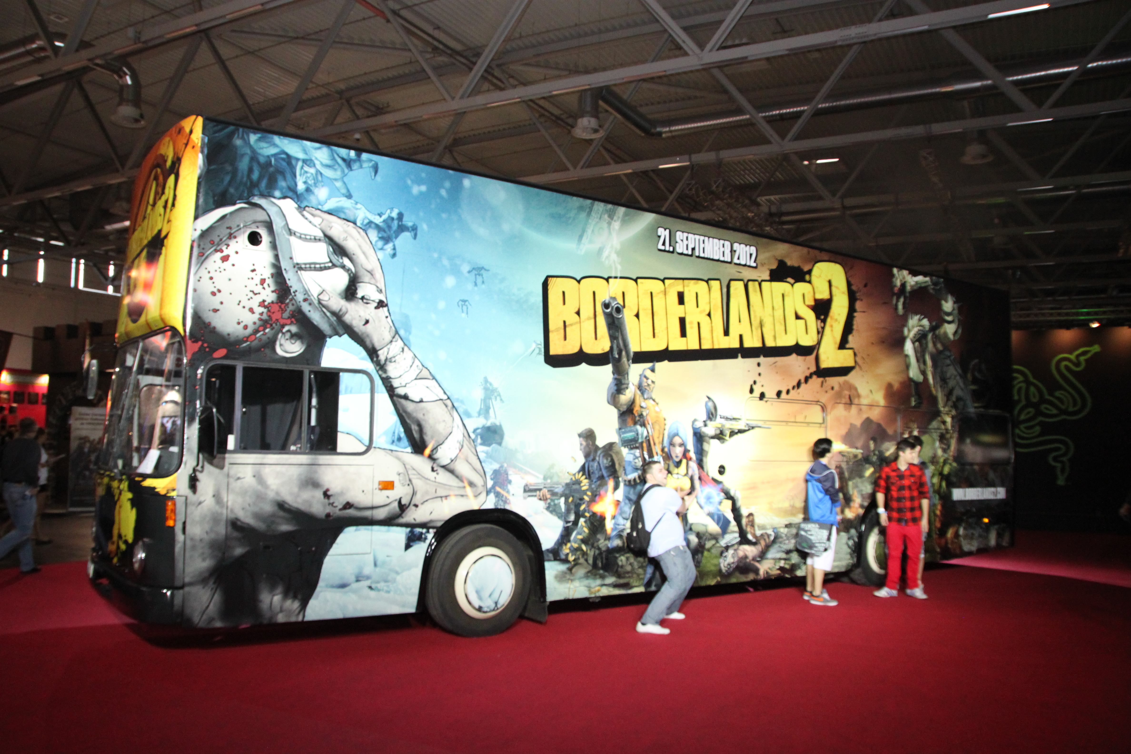 Borderlands-Bus